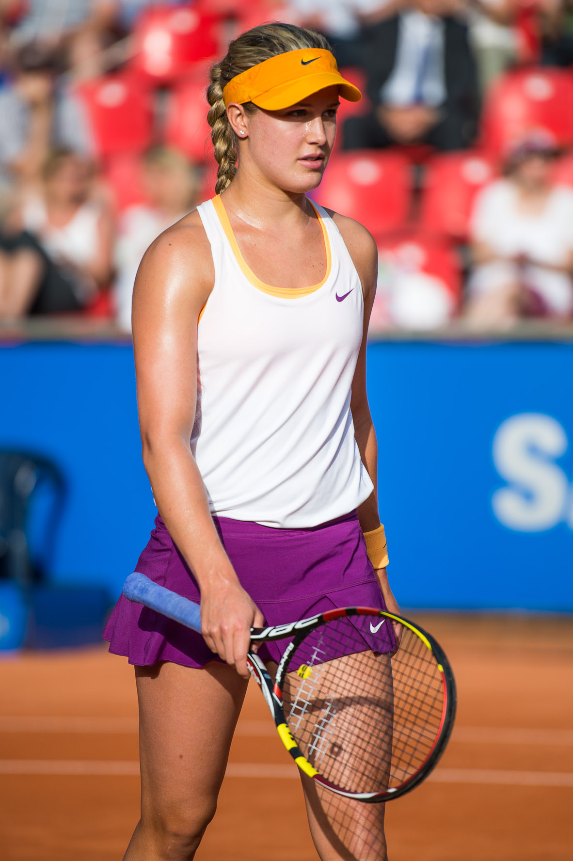 Damentennis,Eugenie Bouchard,Nürnberger Versicherungscup 2014,Tennis,WTA